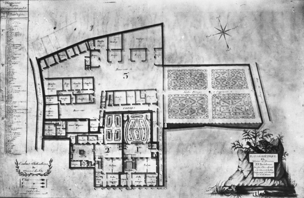 Generaalshuis: 47, plattegrond, naar tekening van Hermans, collectie Jhr. van Riemsdijk